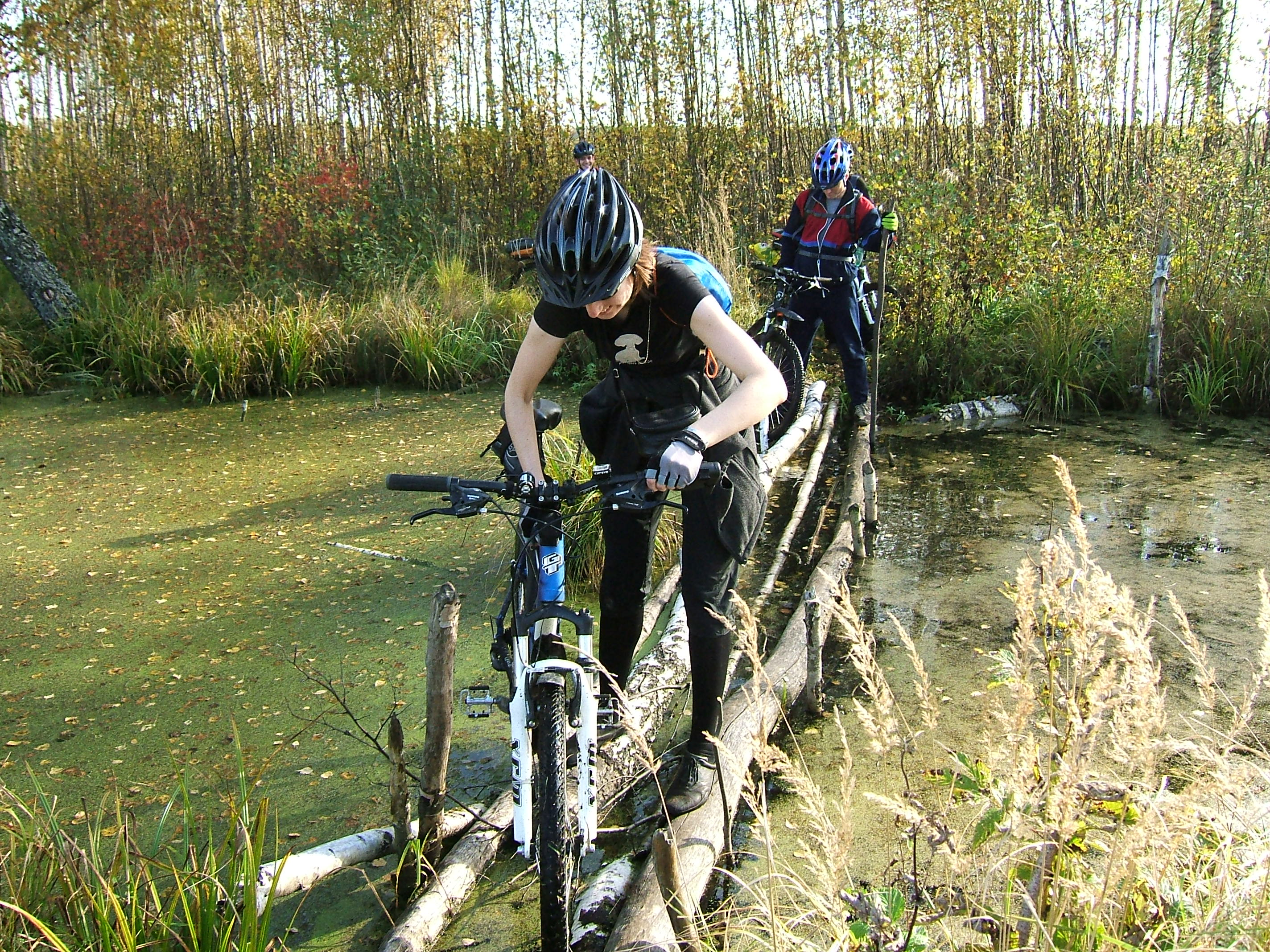 Велотуризм. Велосипедисты в болотах национального парка "Лосиный Остров" (Московская область, Россия).